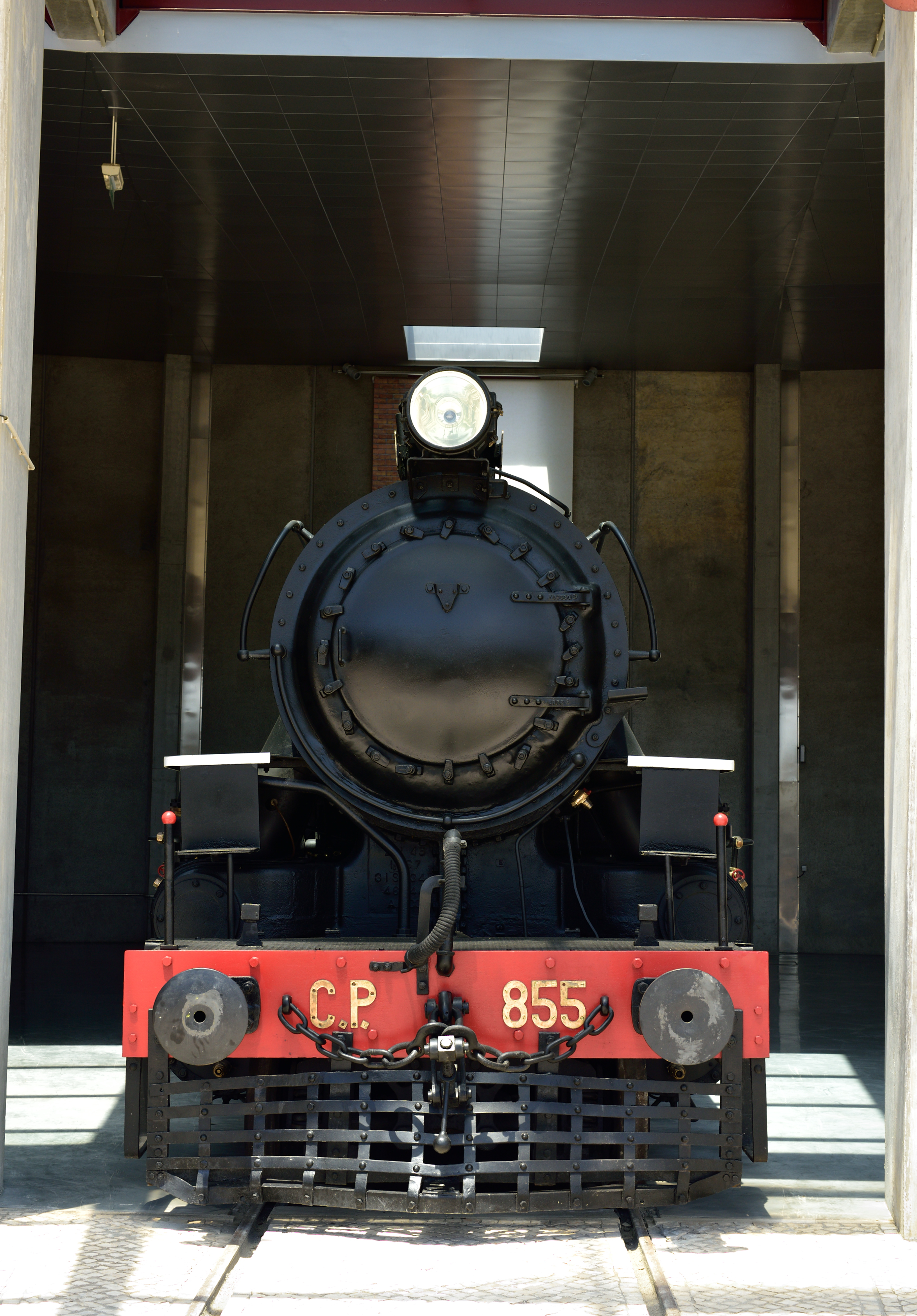 ALCO Mikado, nº 73840 preservado no Museu Nacional Ferroviário, Entroncamento, Portugal ALCO Mikado, build nr 73840 preserved at Museu Nacional Ferroviário (National Railway Museum), Entroncamento, Portugal